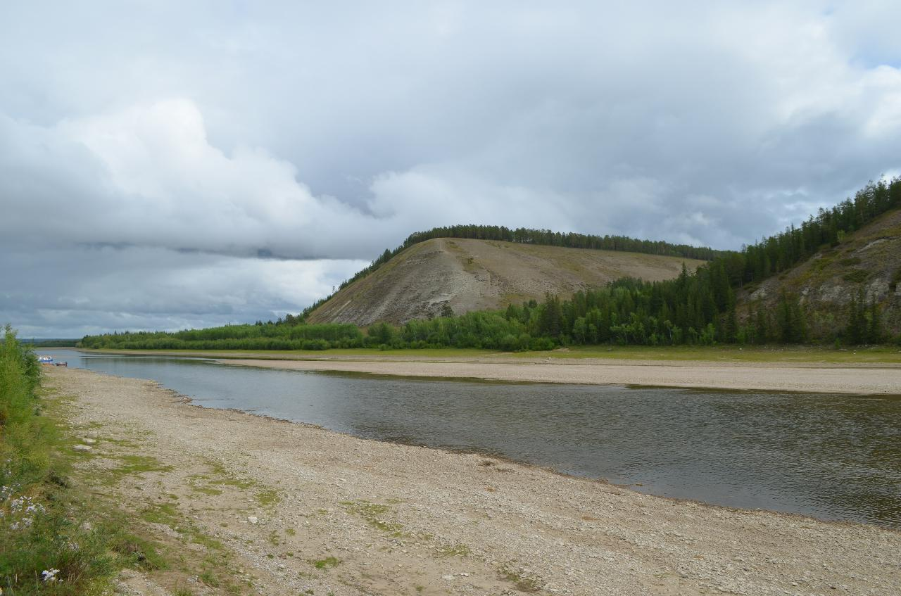 В Усть-Буотамском заповеднике, Хангаласский район, Якутия. Река Буотама